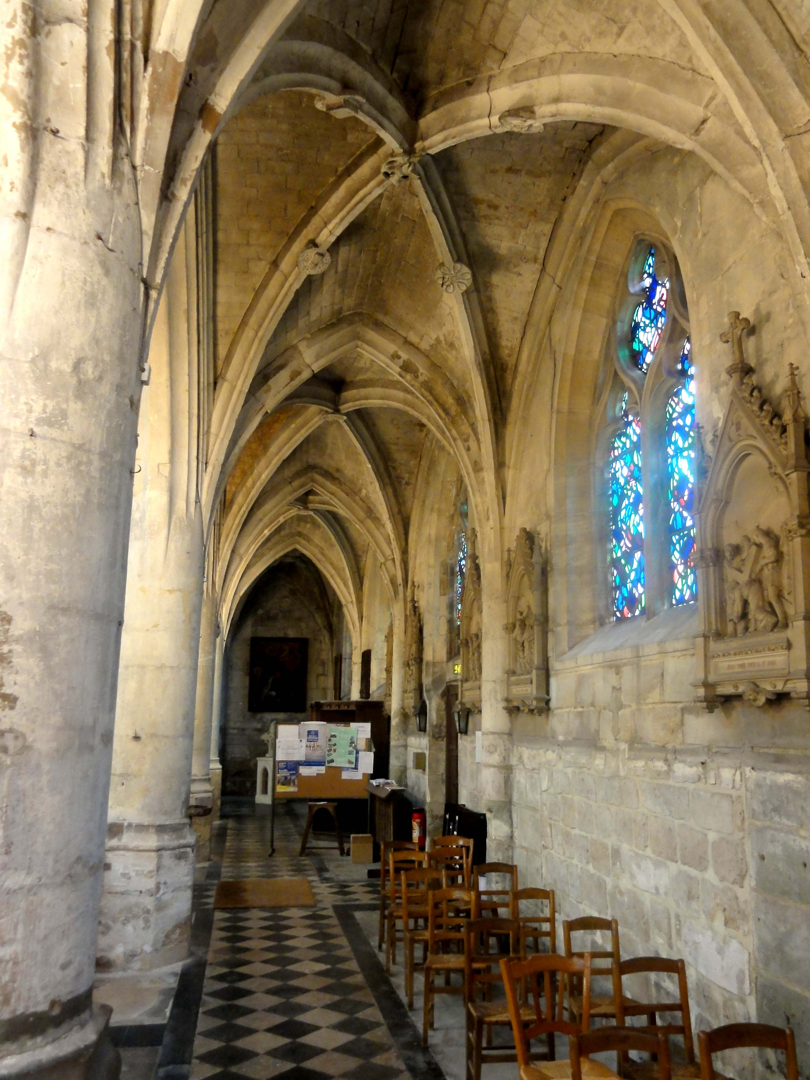 Bas-côté nord, vue vers l'ouest.